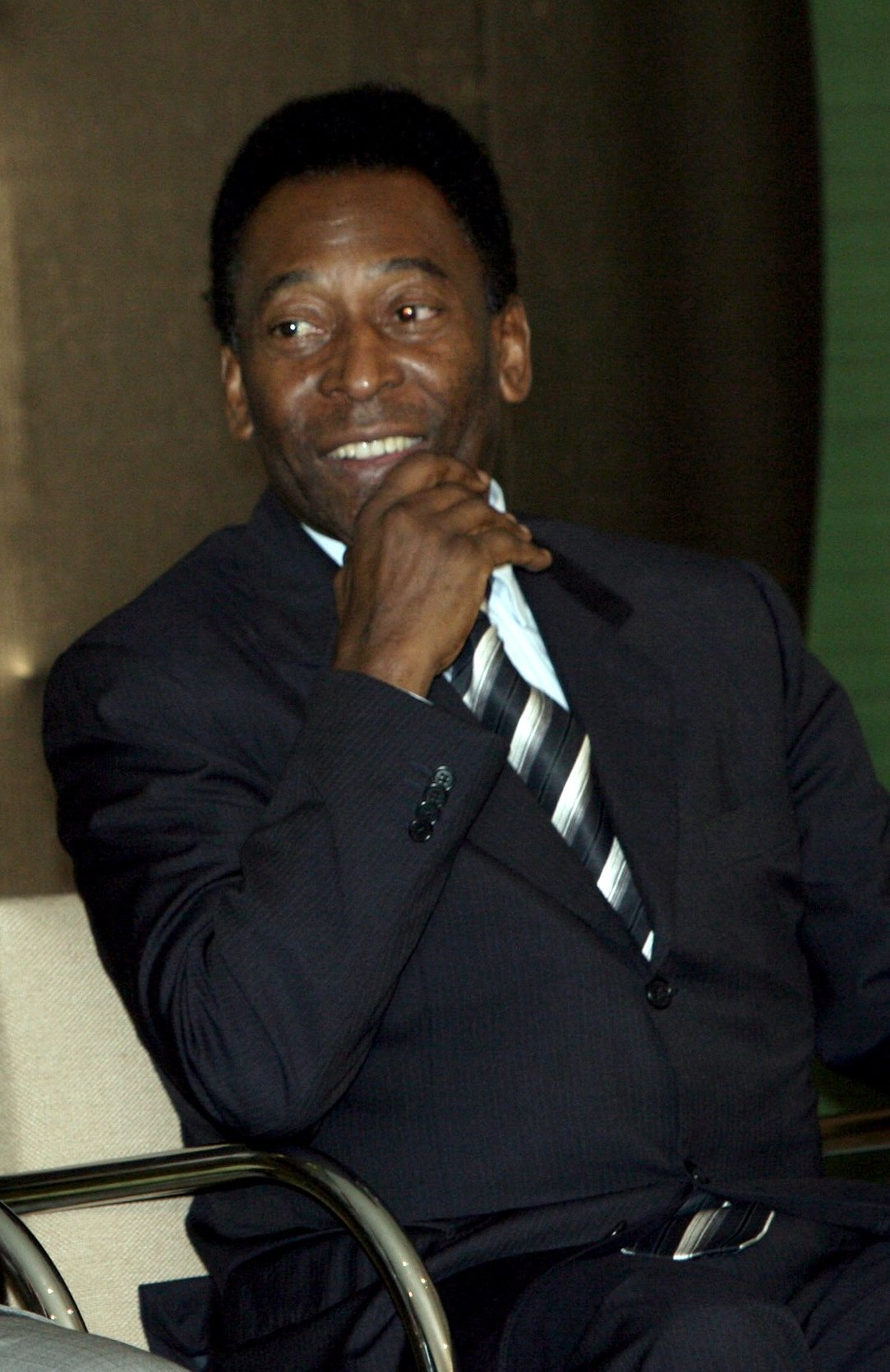 Pelé